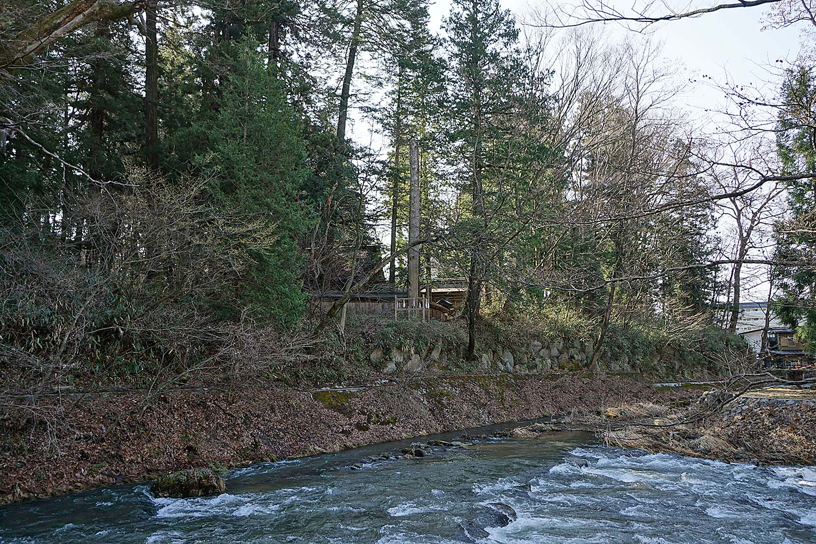 Suwa taisha Shimosha Harumiya , 諏訪大社 下社 春宮 第三之御柱